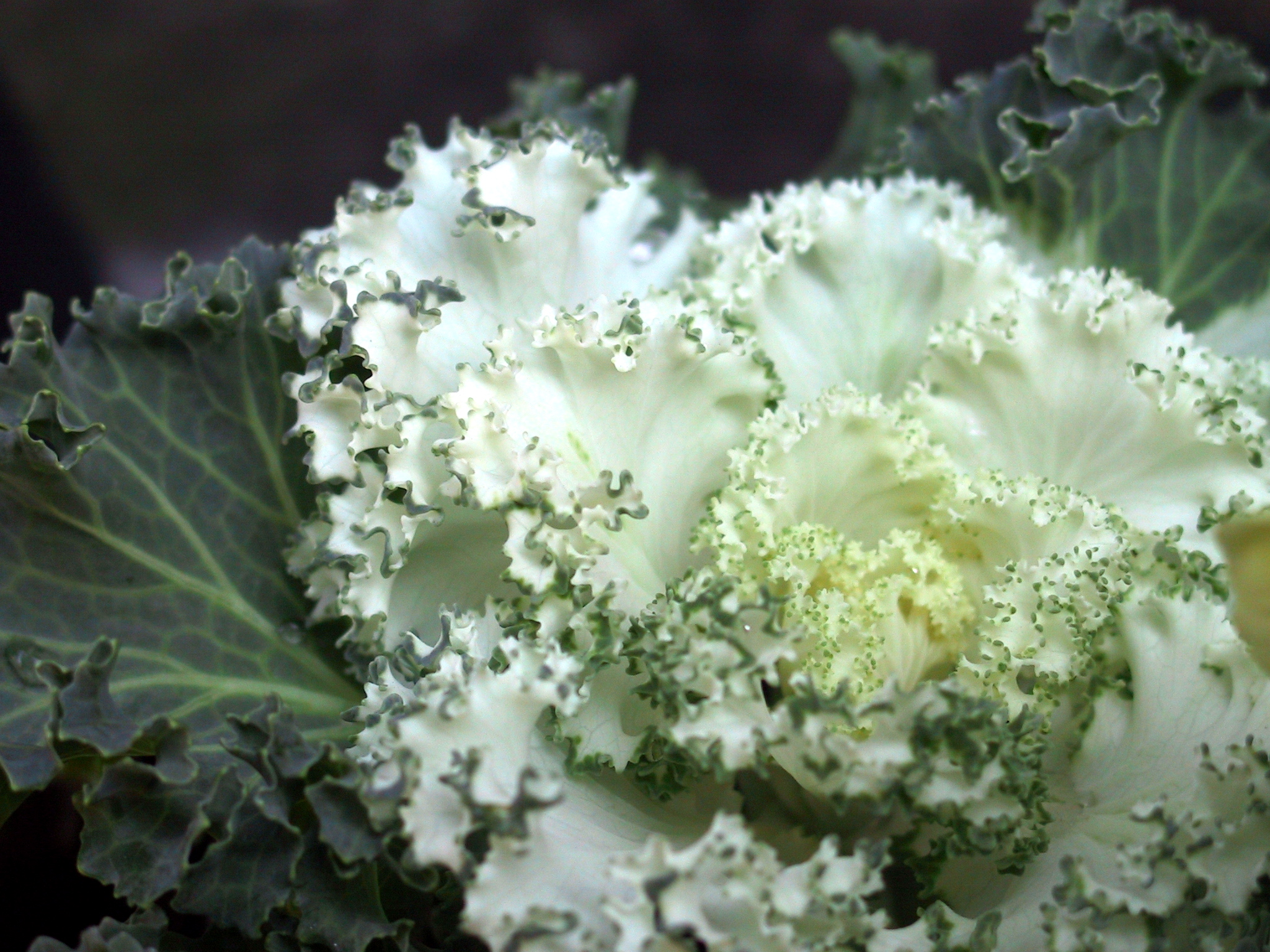 Brassica oleracea